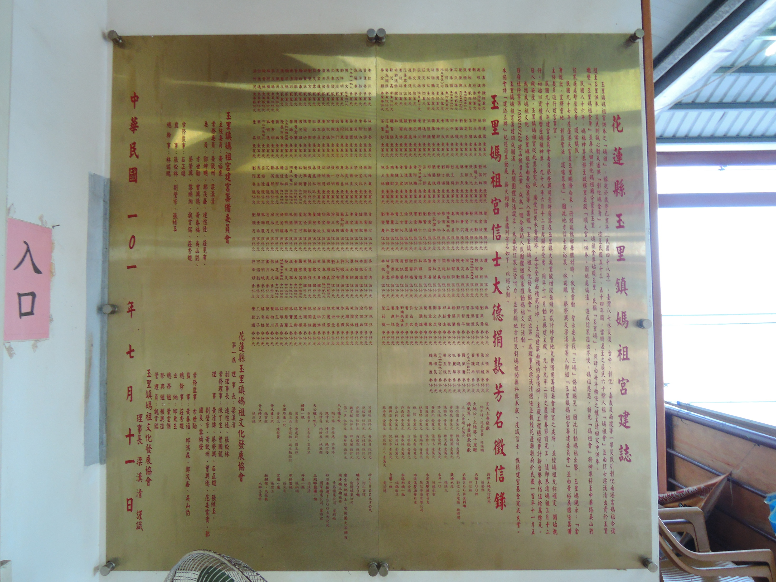 花蓮縣玉里鎮花東縱谷公路64號